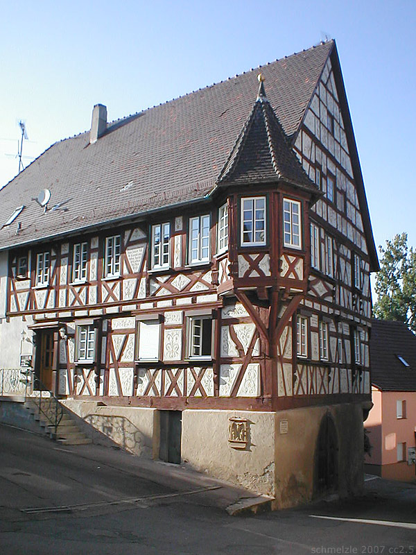 Witwenhaus aus dem 16. Jhd. nahe dem Bautzenschloss in Oedheim, Baden-Württemberg, Germany